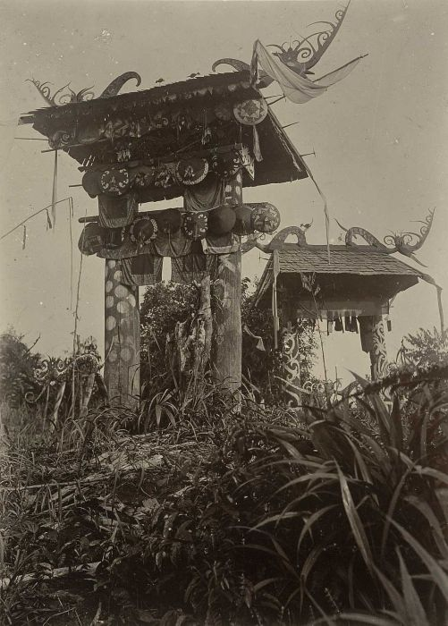 Foto. Deze foto is gemaakt tijdens de Commissiereis naar Centraal-Borneo van A.W. Nieuwenhuis. Het graf van een dochter van een Kenja Dajak vorst